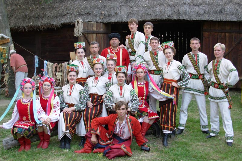 фото колективу